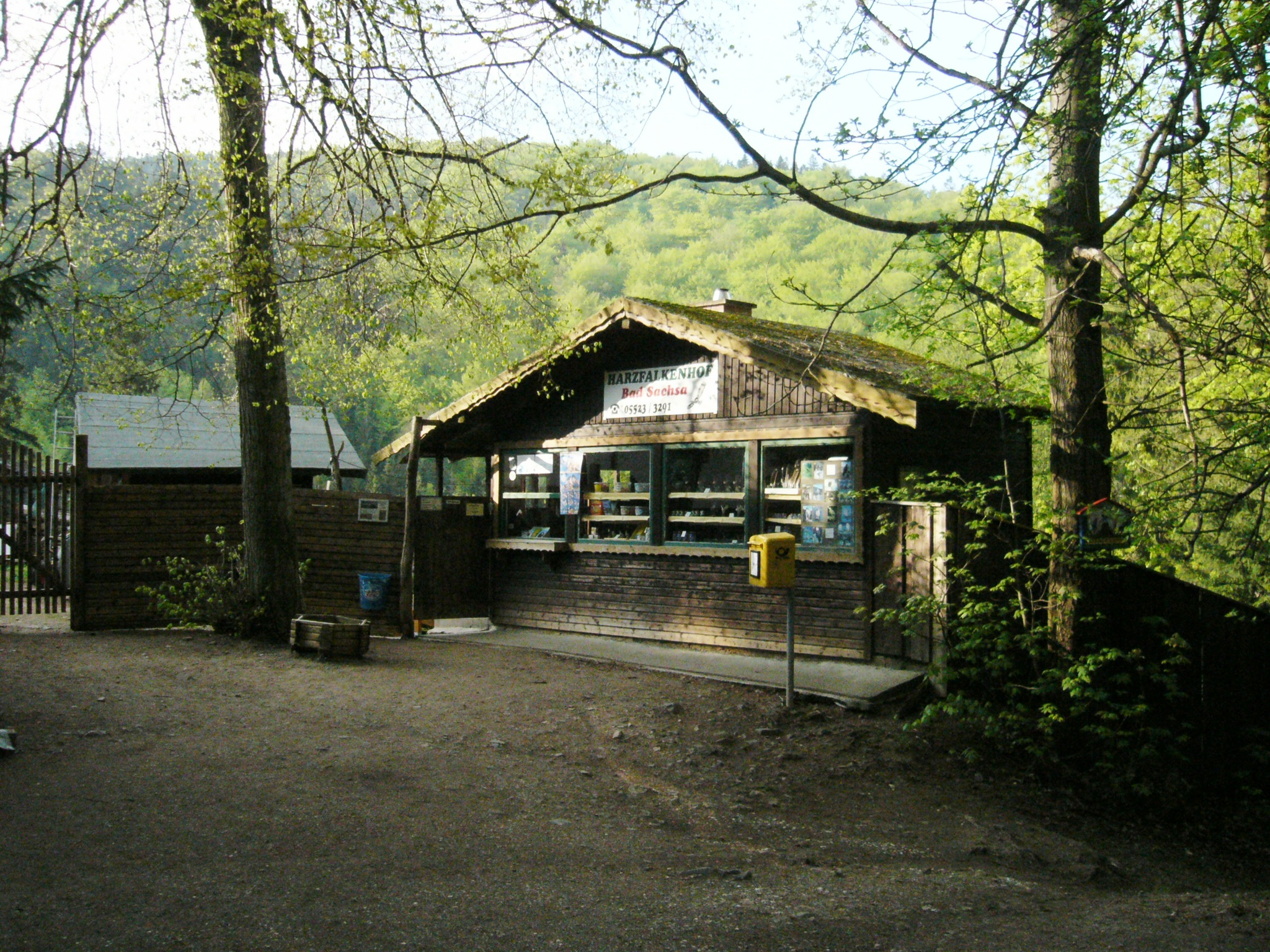 Eingang Harzfalkenhof mit Kiosk